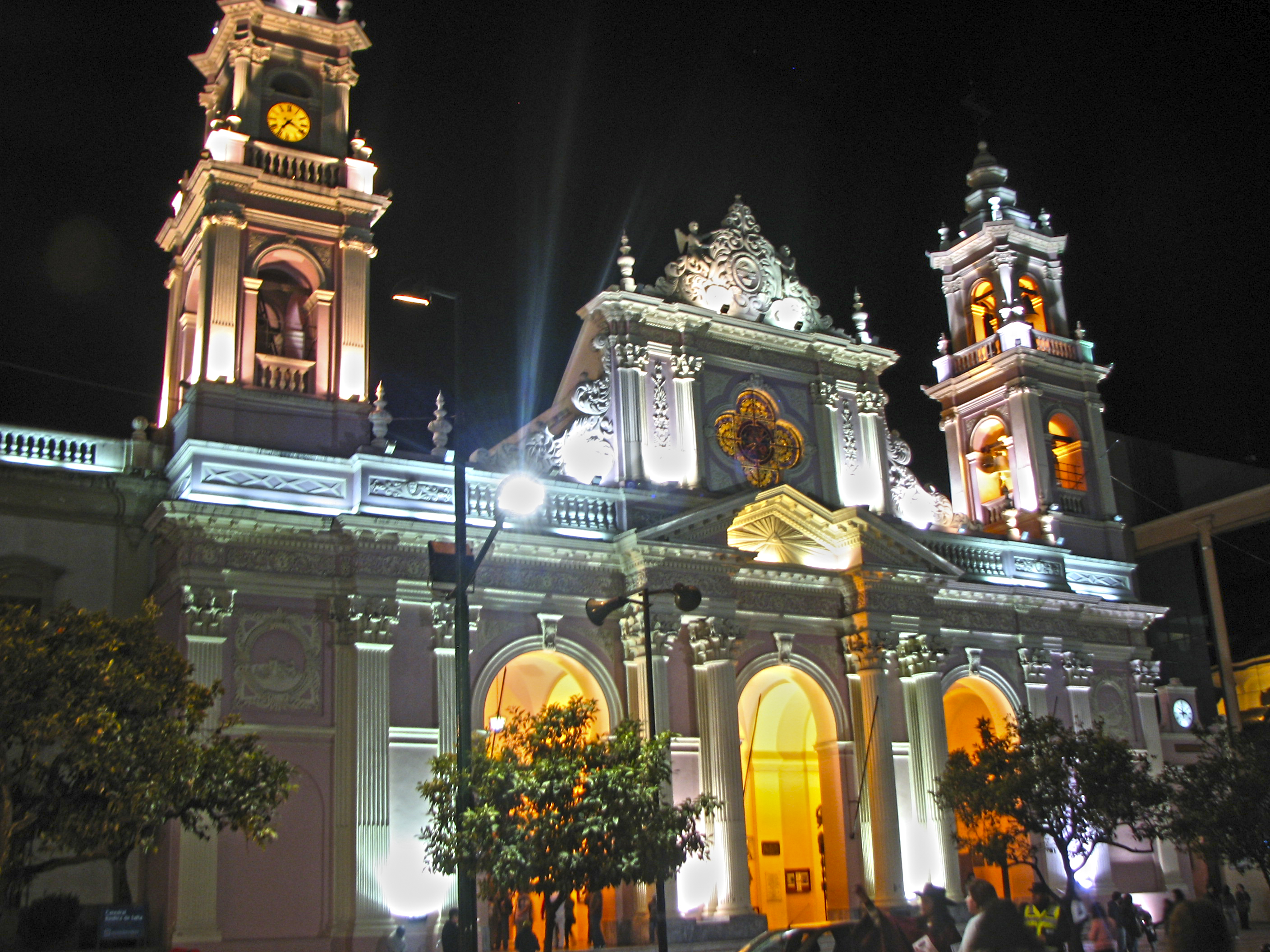 Frente Catedral de Salta